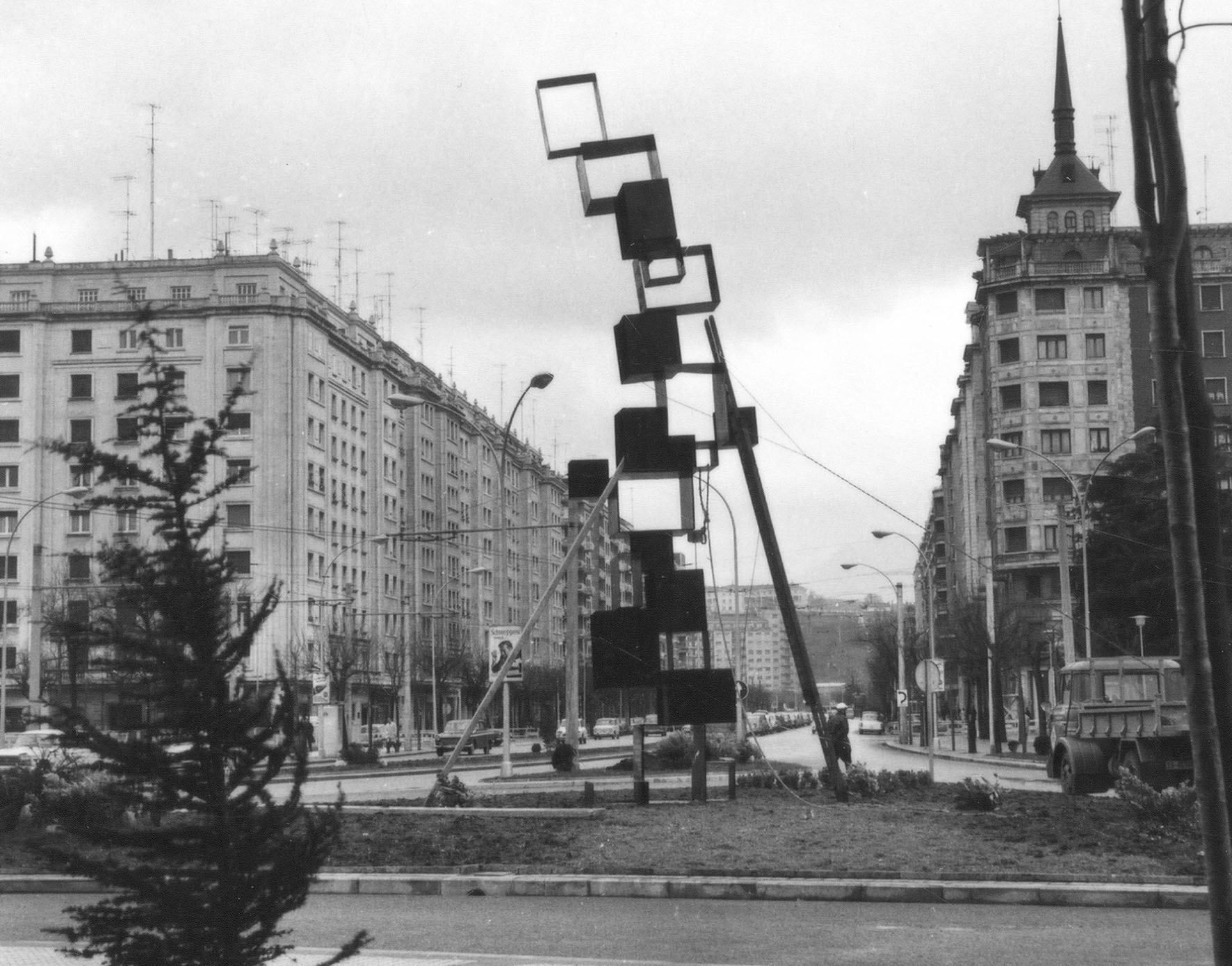 Rikardo Ugarteren Estela eskulturta Amaran.